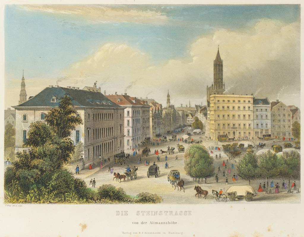 Hamburg, Blick von der Altmannshöhe in die Steinstraße (vorn rechts der Schweinemarkt, dahinter der Kirchturm von St. Jacobi, im Hintergrund St. Michaelis, ganz links St. Katharinen)